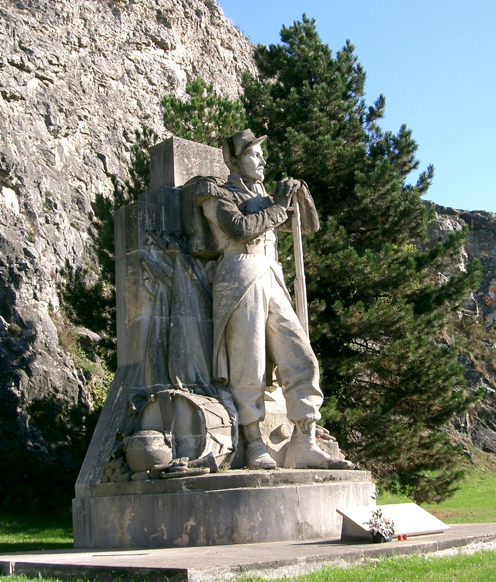 statue de G. Diebolt déplacée du pont de l'Alma à Paris à Dijon et représentant un soldat grenadier - elle accompagnait la célèbre statue du Zouave. photo personnelle PRA Licensing Catégorie:Sculpture (?uvre) Catégorie:Dijon